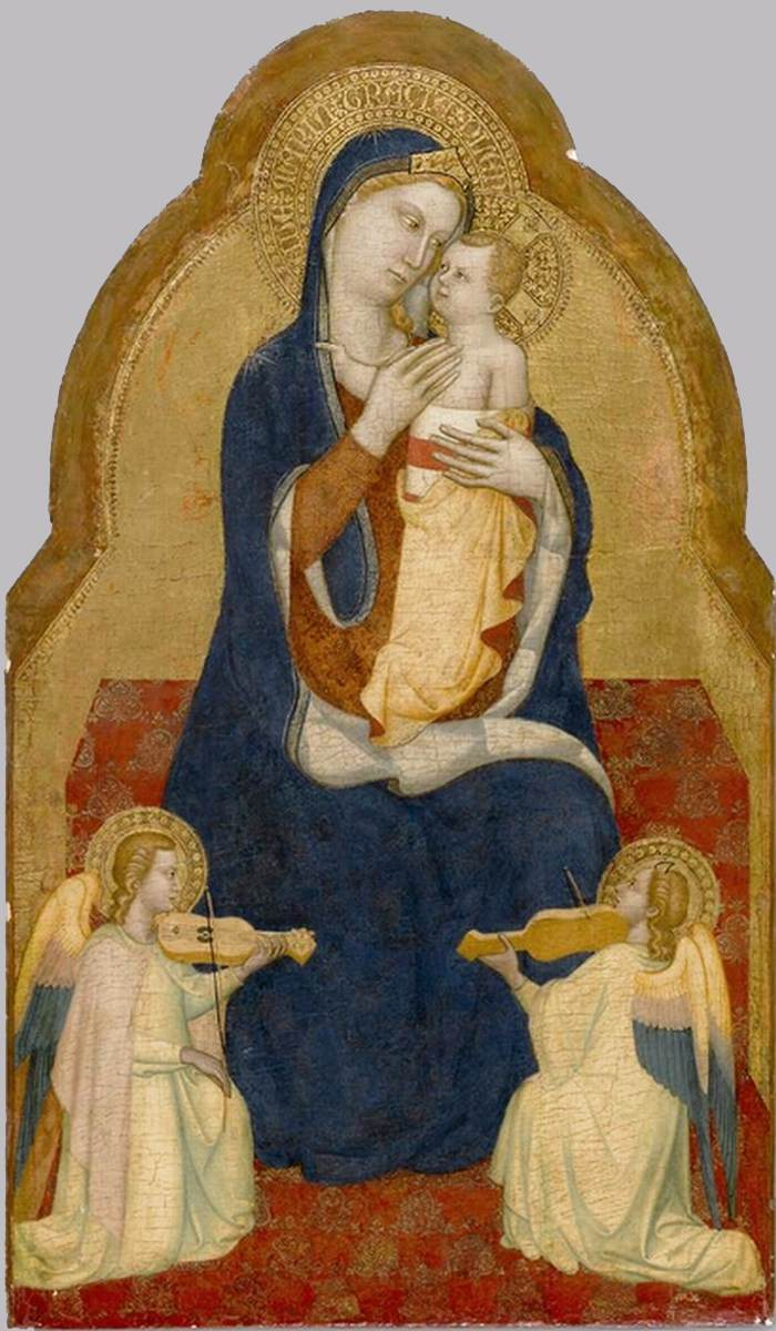 Puccio di Simone - Madonna and Child with Angels c. 1350 Tempera on panel, 97 x 57 cm Norton Simon Museum of Art, Pasadena